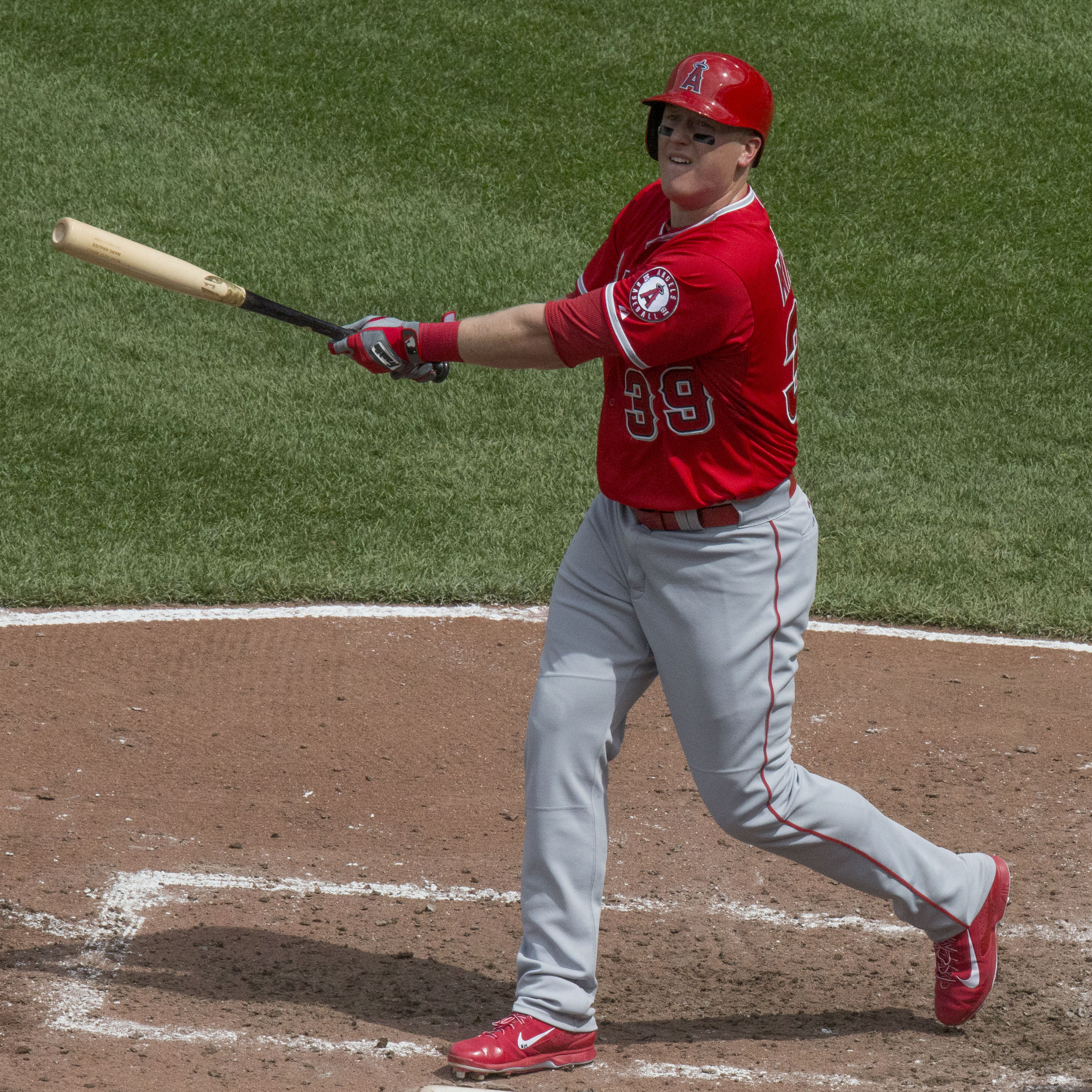 Marc Krauss